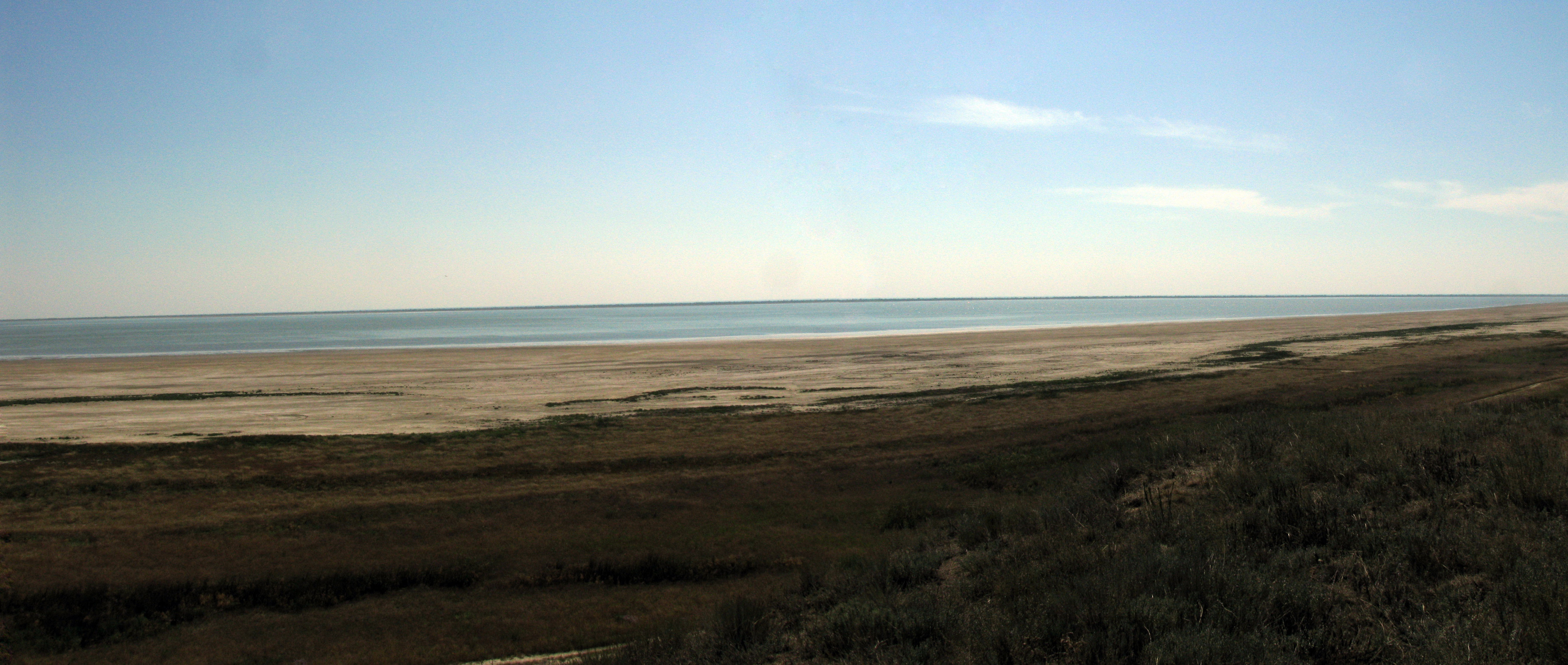 Панорама Витязевского лимана по пути в Благовещенскую из Виноградного.